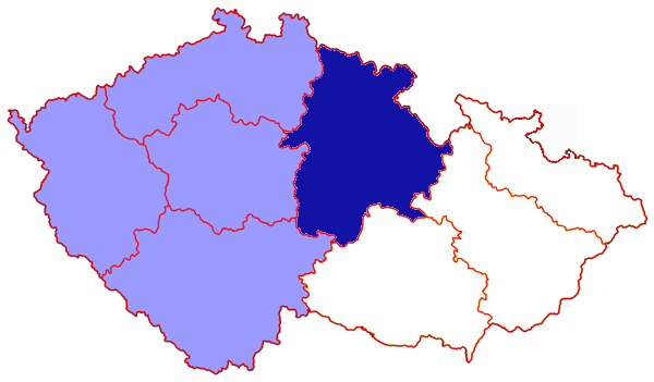 Mappa della diocesi cattolica di Hradec Kralove, nella Repubblica Ceca. Lavoro personale.